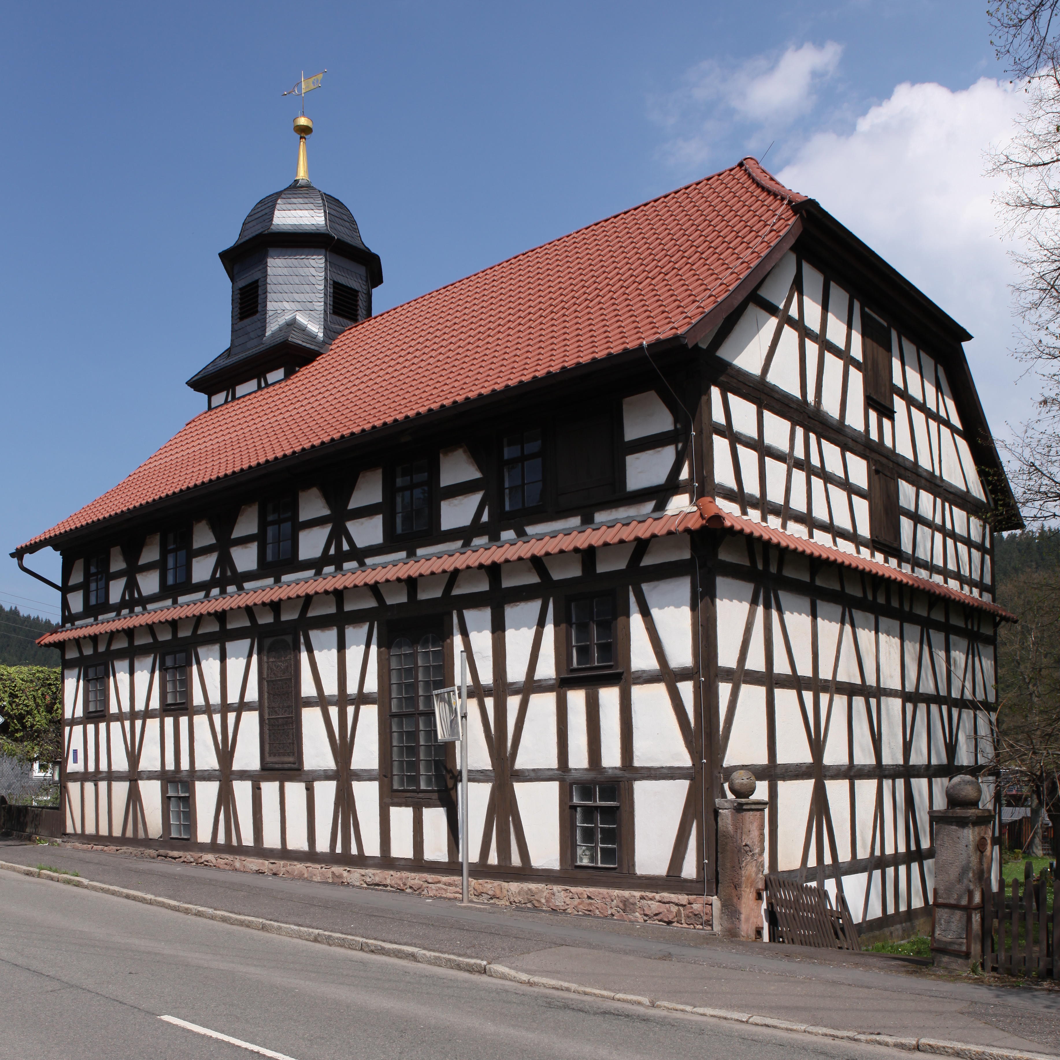 Kirche St. Ulrich, 16. Jahrhundert, in Mäbendorf, Ot von Suhl